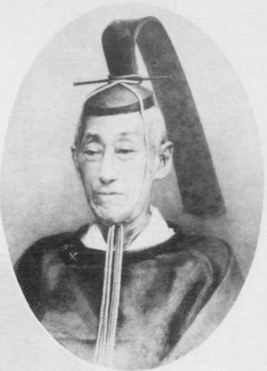 a Japanese Prince 有栖川宮幟仁親王 (Arisugawa Takahito)